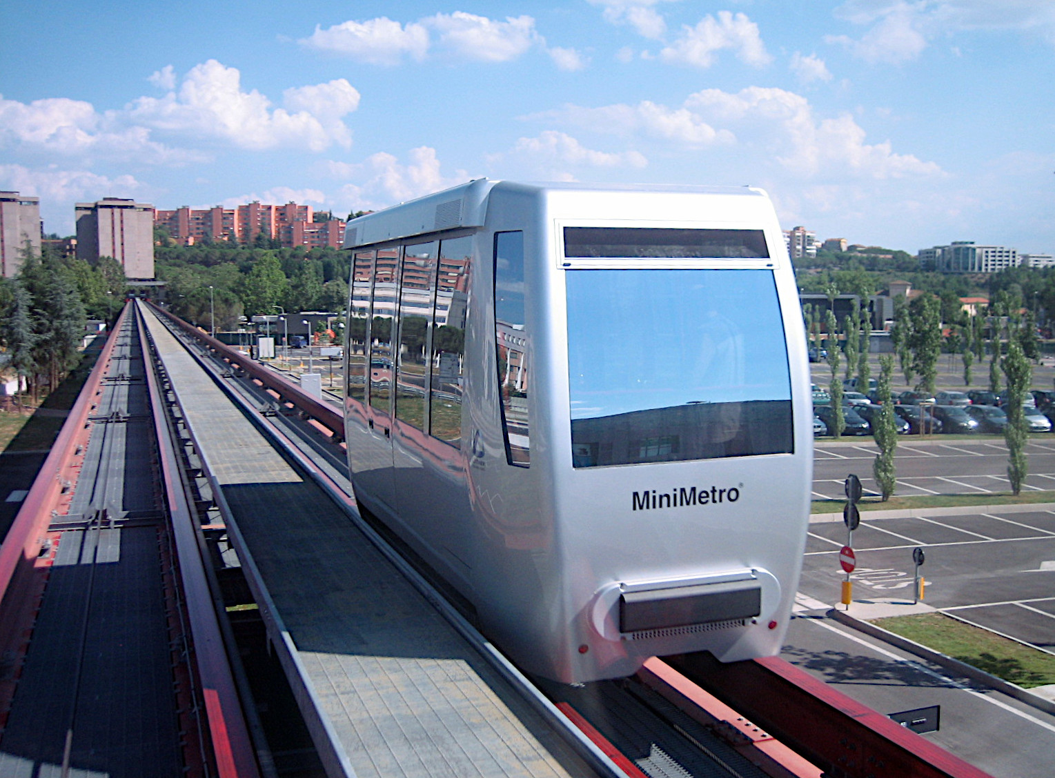 una cabina in primo piano del minimetrò di Perugia